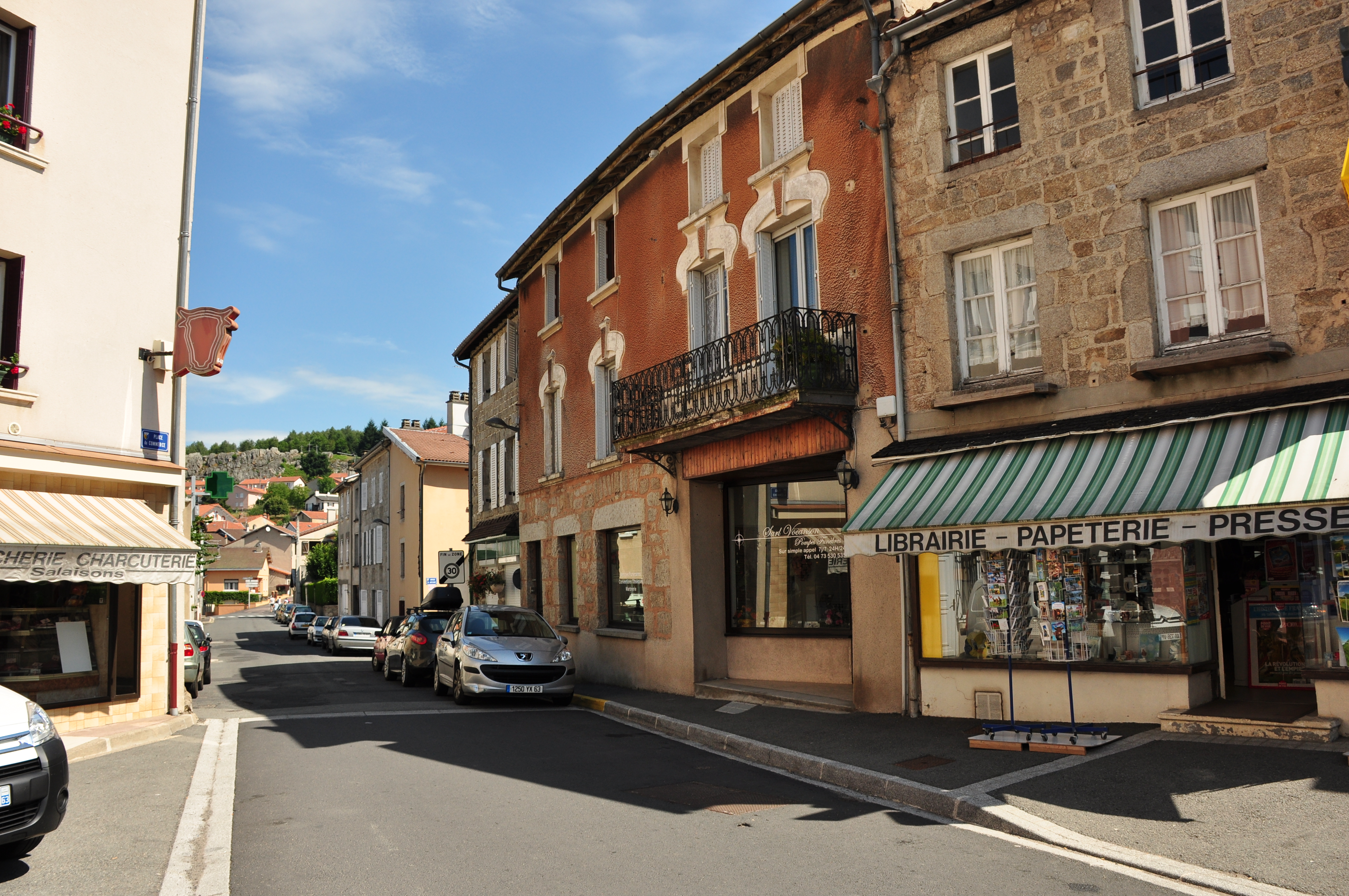 Saint-Rémy-sur-Durolle